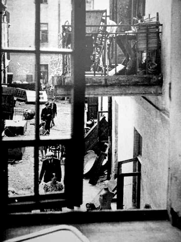 Widok po deportacji Żydów - okupacja niemiecka w Szydłowcu, Polska wrzesień 1942 r.